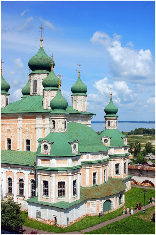 Успенский собор: переулок Музейный, 4, Переславль-Залесский, Ярославская область